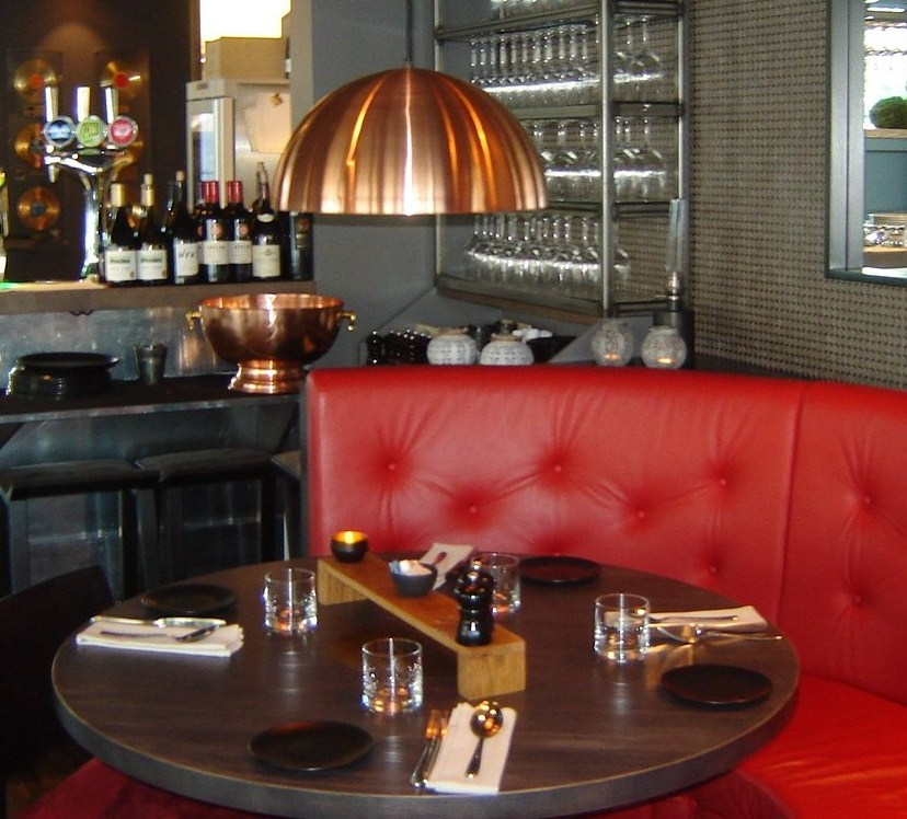 Melody hotell, Stockholm. Fotograf: Pernilla Ström